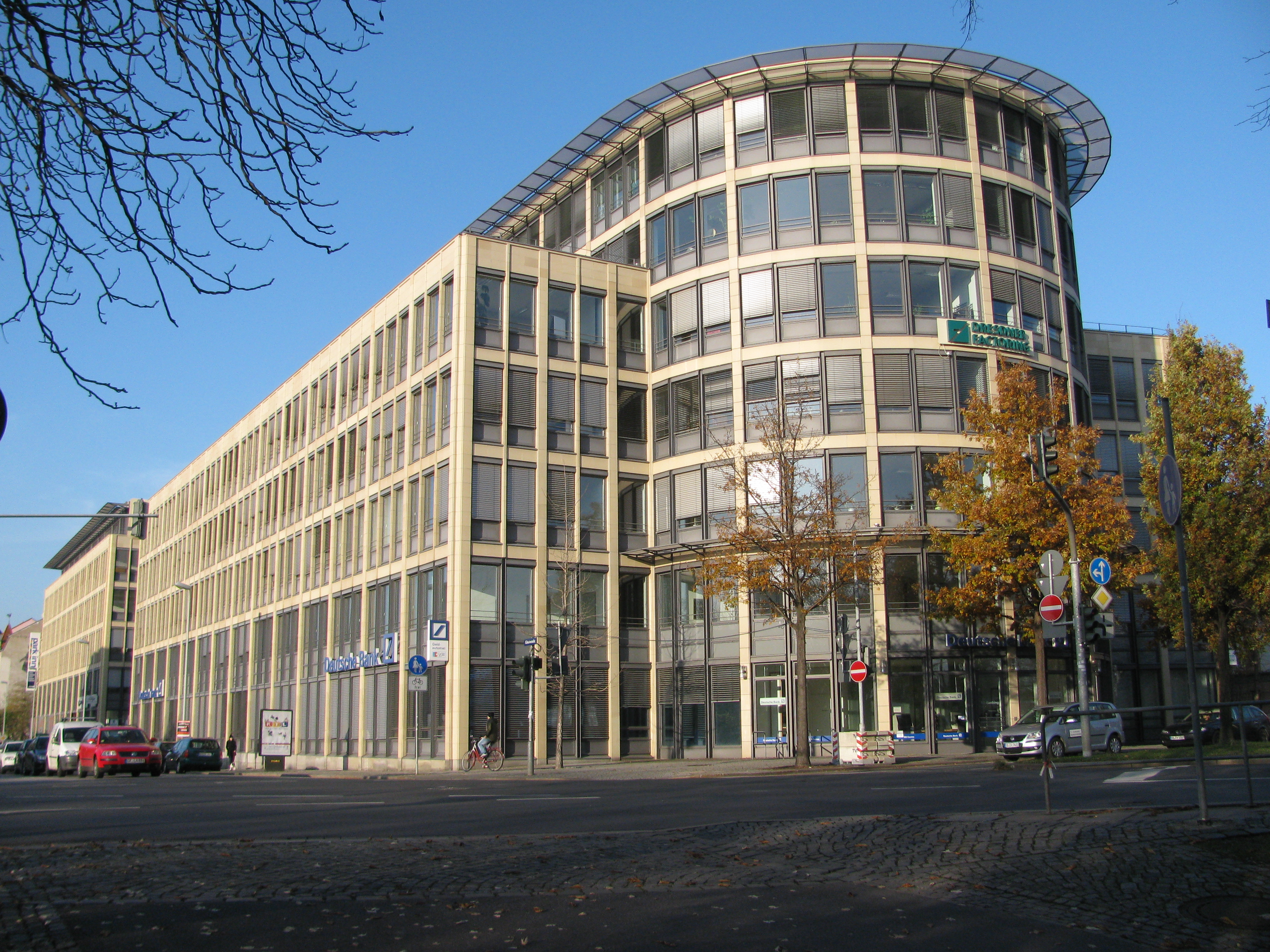 Atrium am Rosengarten, Sitz des Ortsamtes Neustadt, Rosa-Luxemburg-Platz/Glacisstraße/Hoyerswerdaer Straße, Dresden